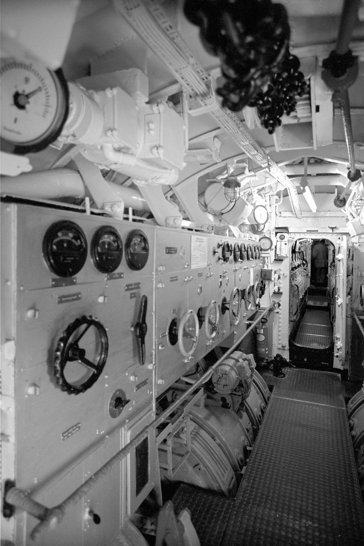 VII C U-Boot E-Maschine